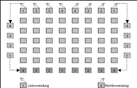 Enfilade (Converion), Schützenwechsel der Arkebusiere / Musketiere